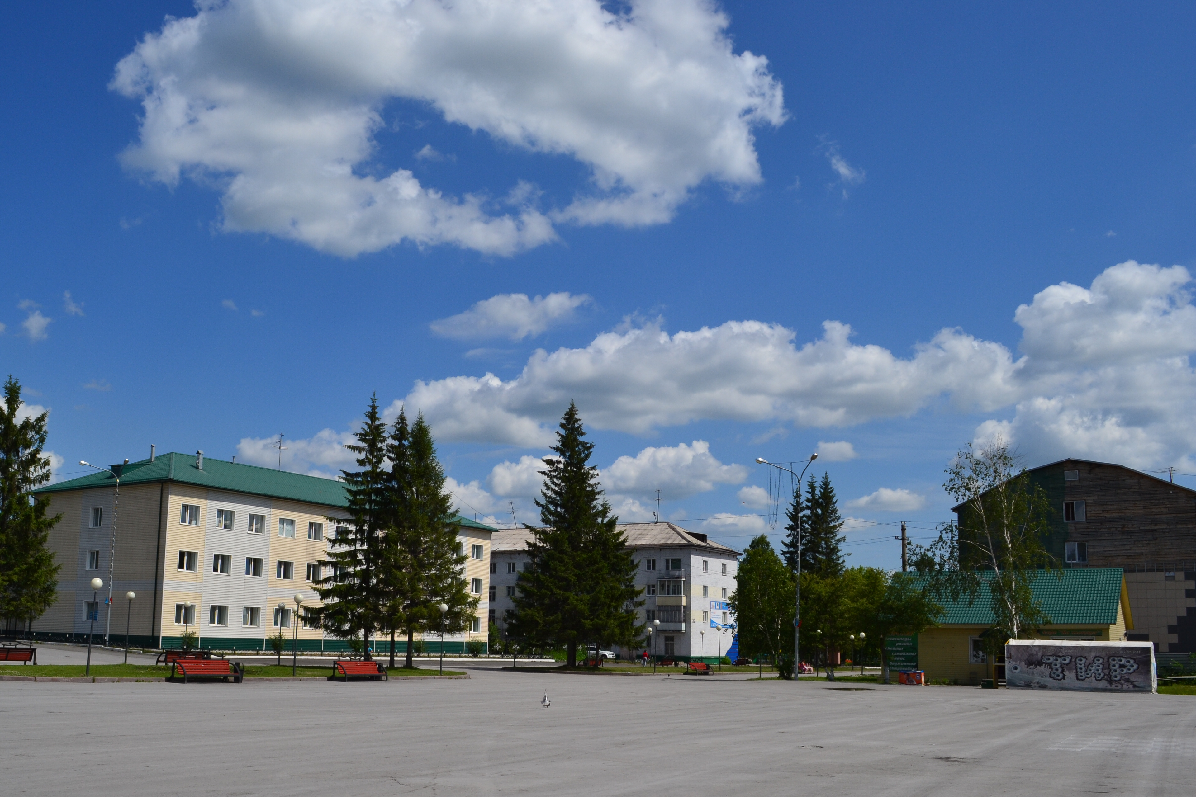 (Кемеровская область, Топки, привокзальная площадь)